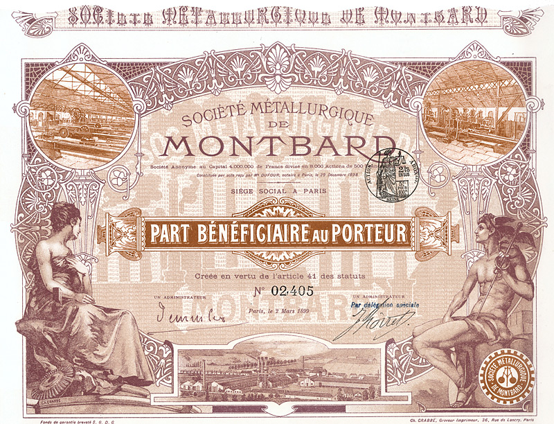 Part Beneficiaire der Soc. Metallurgique de Montbard S.A. vom 2. März 1899